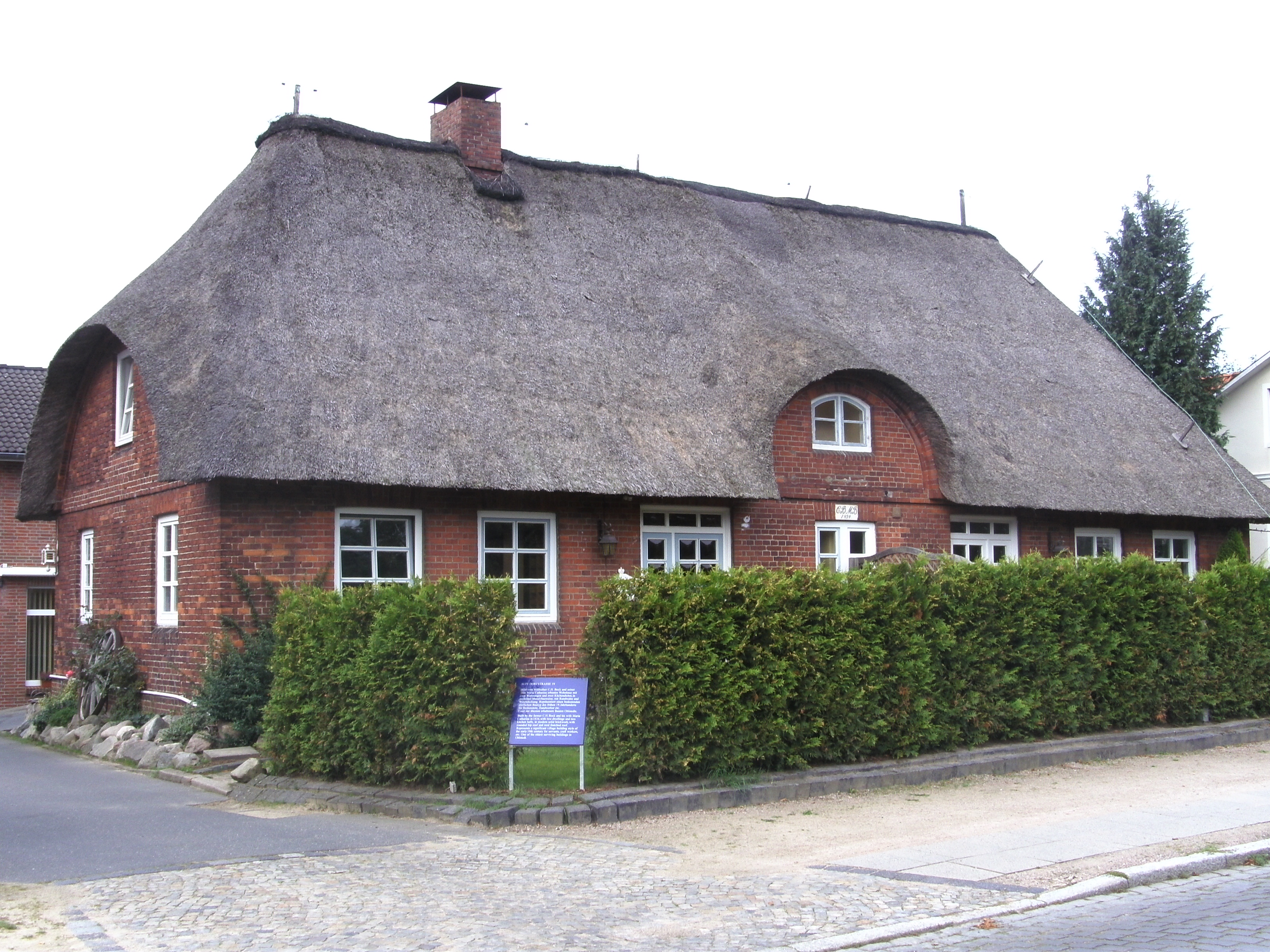 Alte Dorfstraße 19 This is a photograph of an architectural monument.